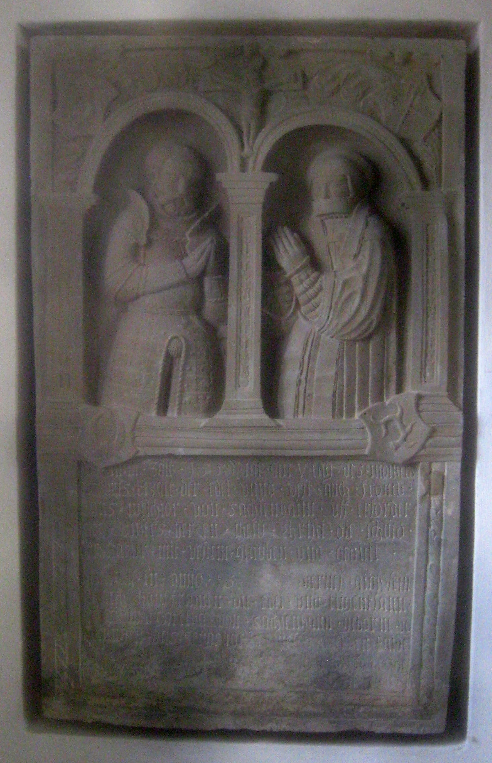 Grabmal von Hans Melchior von Sachsenheim (gestorben 1559)und seiner Frau Margaretha von Venningen (gestorben 1569, Sachsenheim, Kirche St. Fabian und St. Sebastian.